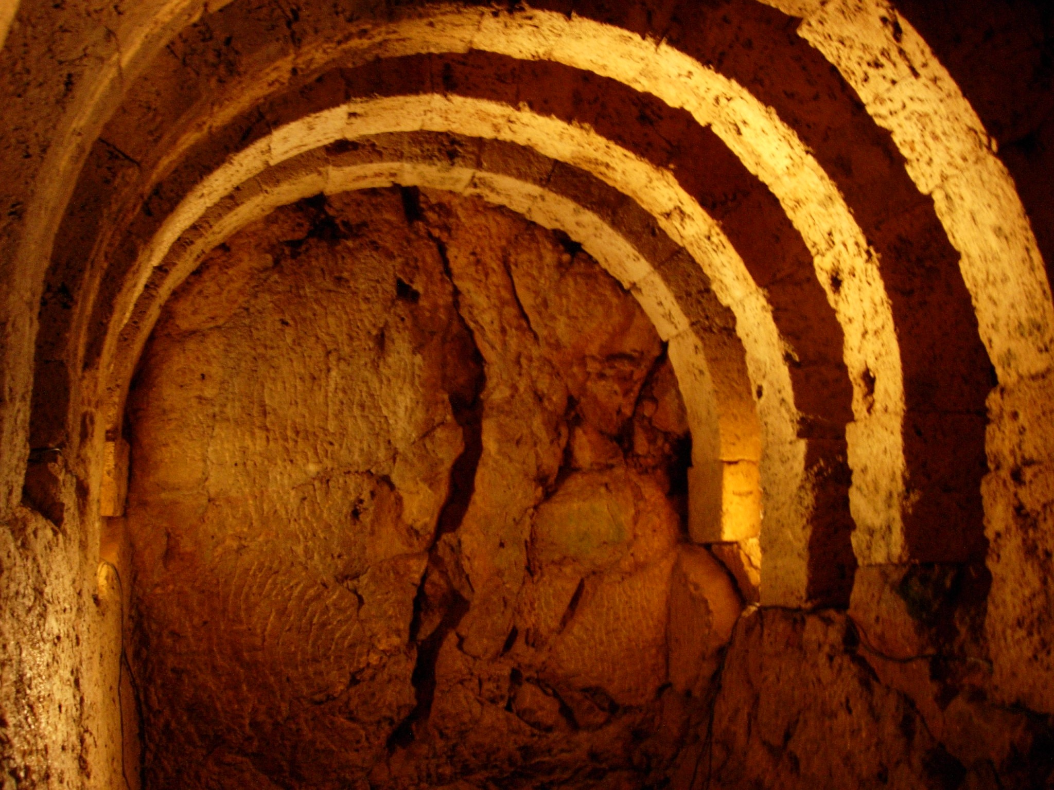 Nekromanteionin oraakkeli.